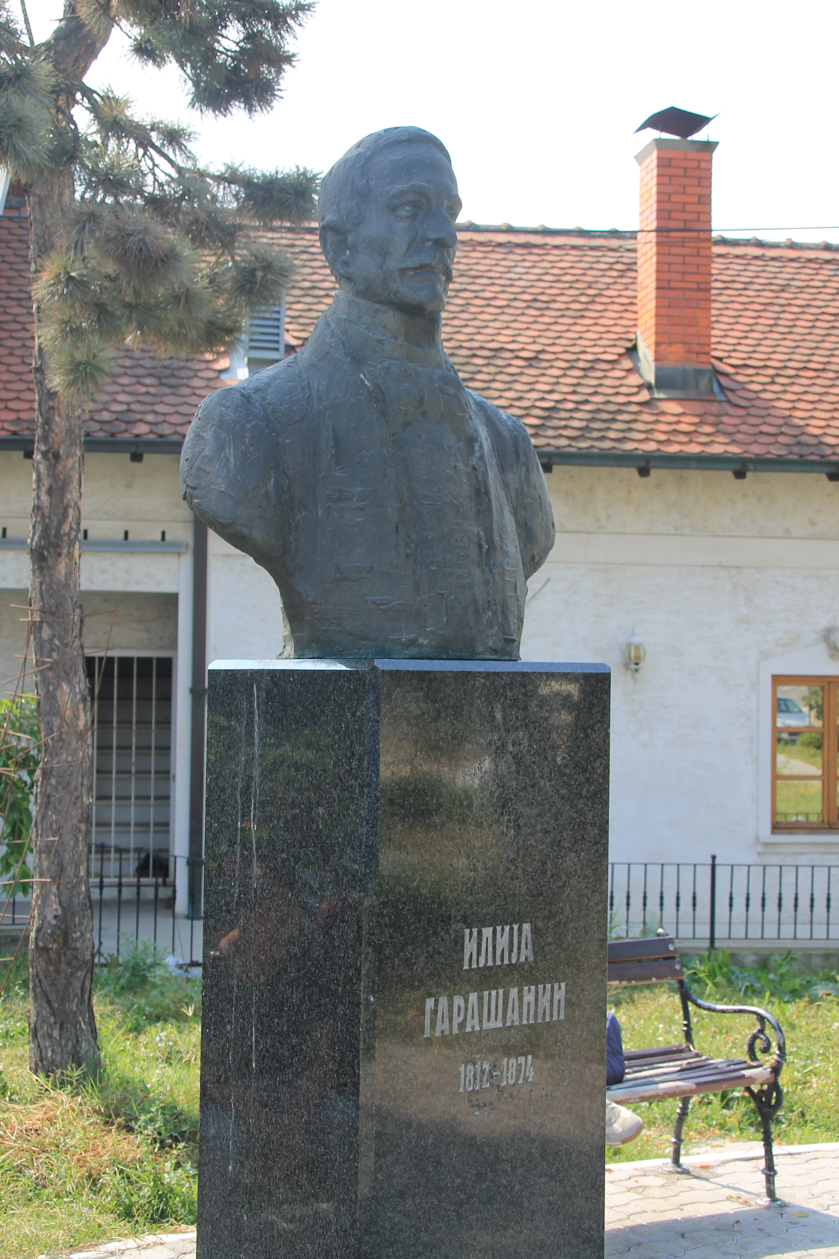 Monuments in Grocka